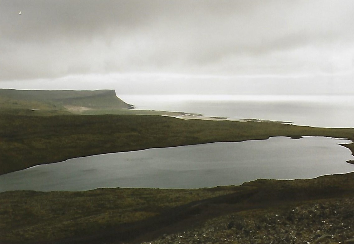 Dänemarkstraße vor Breiðavík in Vestfirðir